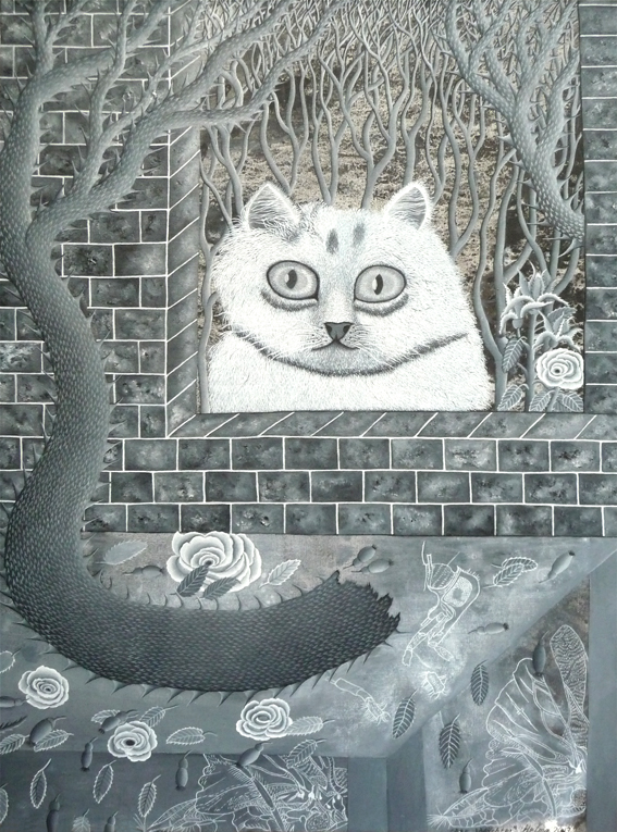 Die Aufnahme entstand am 15.9.2015 im Berliner Atelier von Helma.